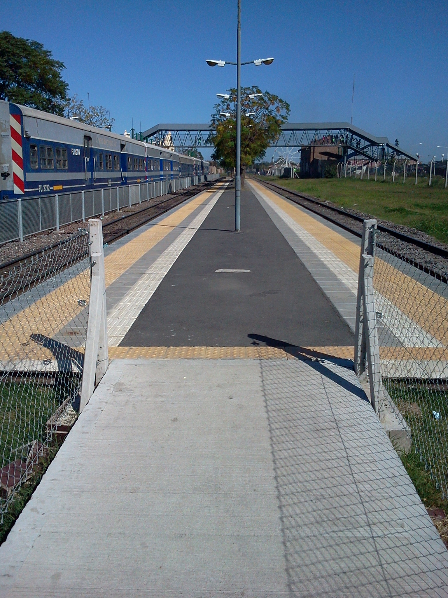 Andén lateral y central